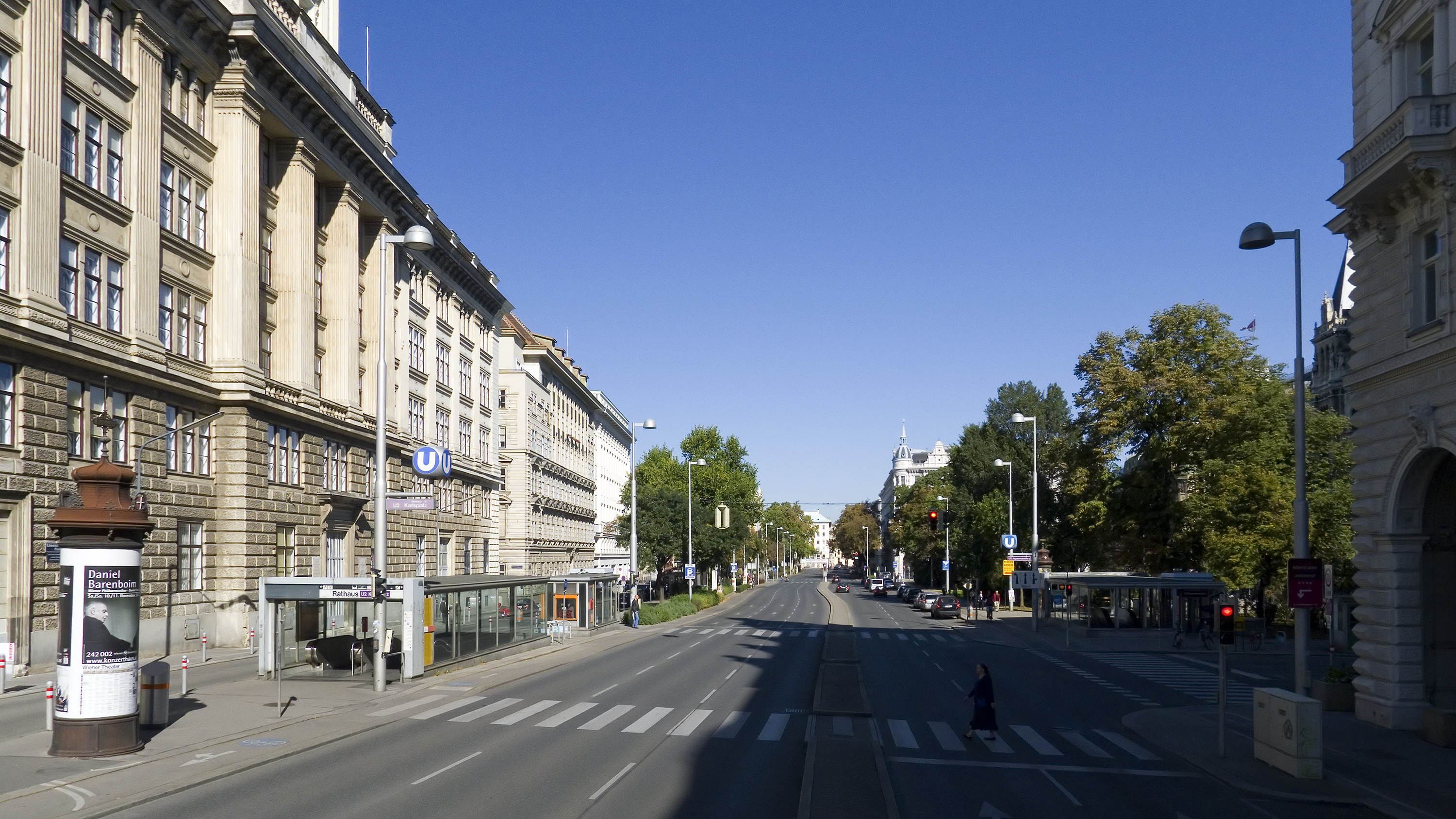 Friedrich-Schmidt-Platz in Wien 1 bei der Landesgerichtsstraße Nr. 8 Richtung Norden